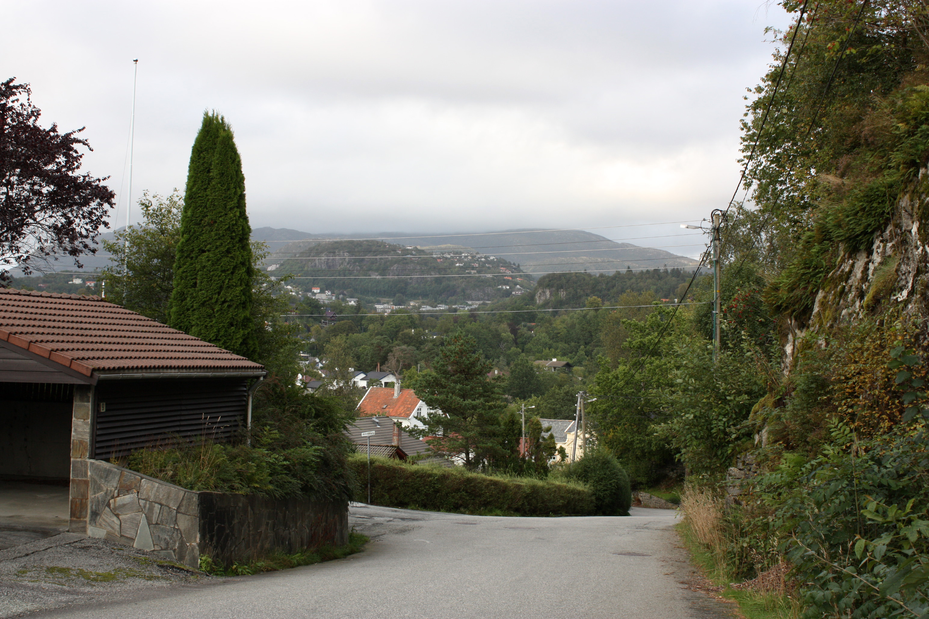 Hovdenvegen, Fana, Bergen.